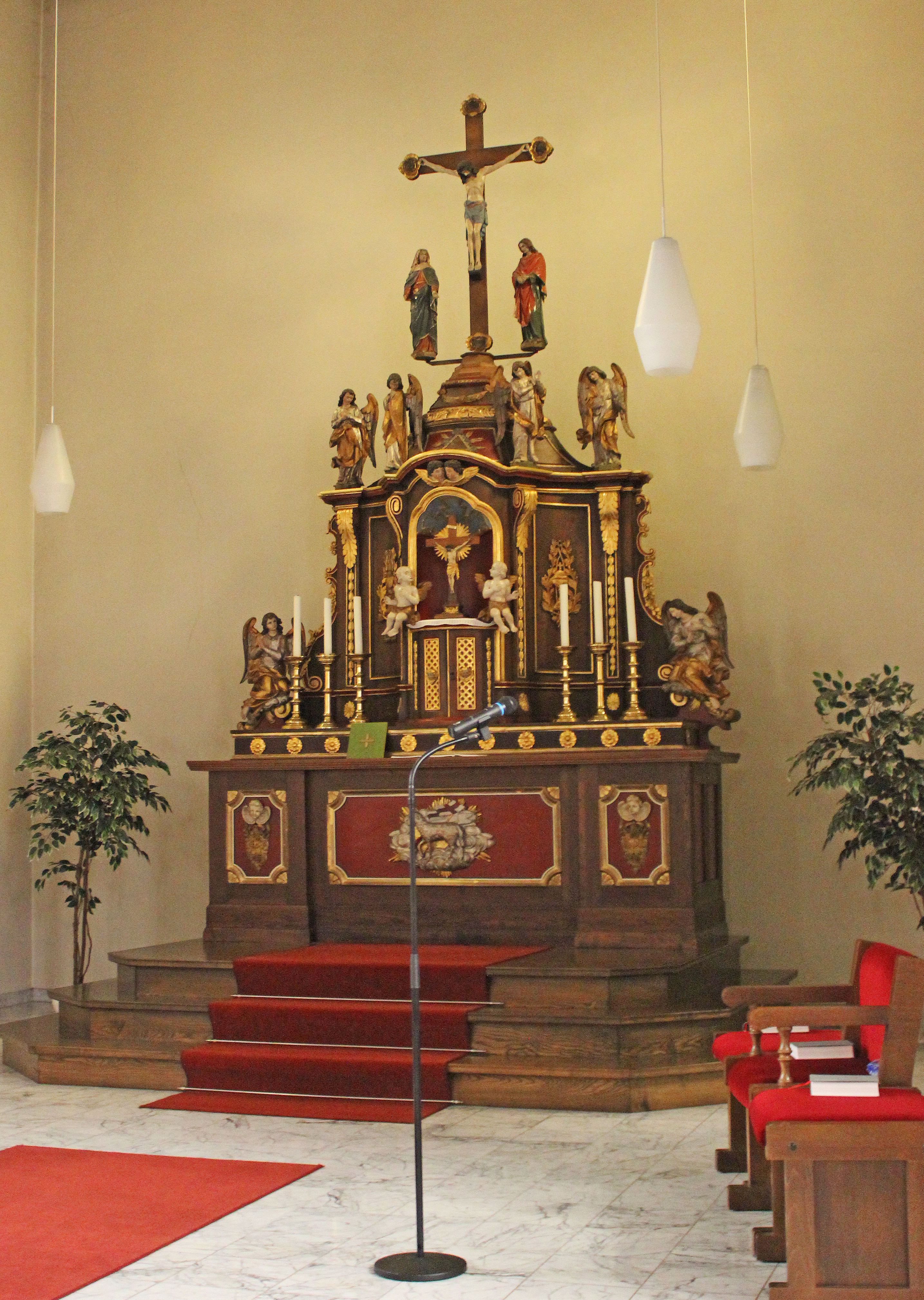 Hochaltar der katholischen Pfarrkirche St. Antonius in Werbeln, Gemeinde Wadgassen, Landkreis Saarlouis, Saarland